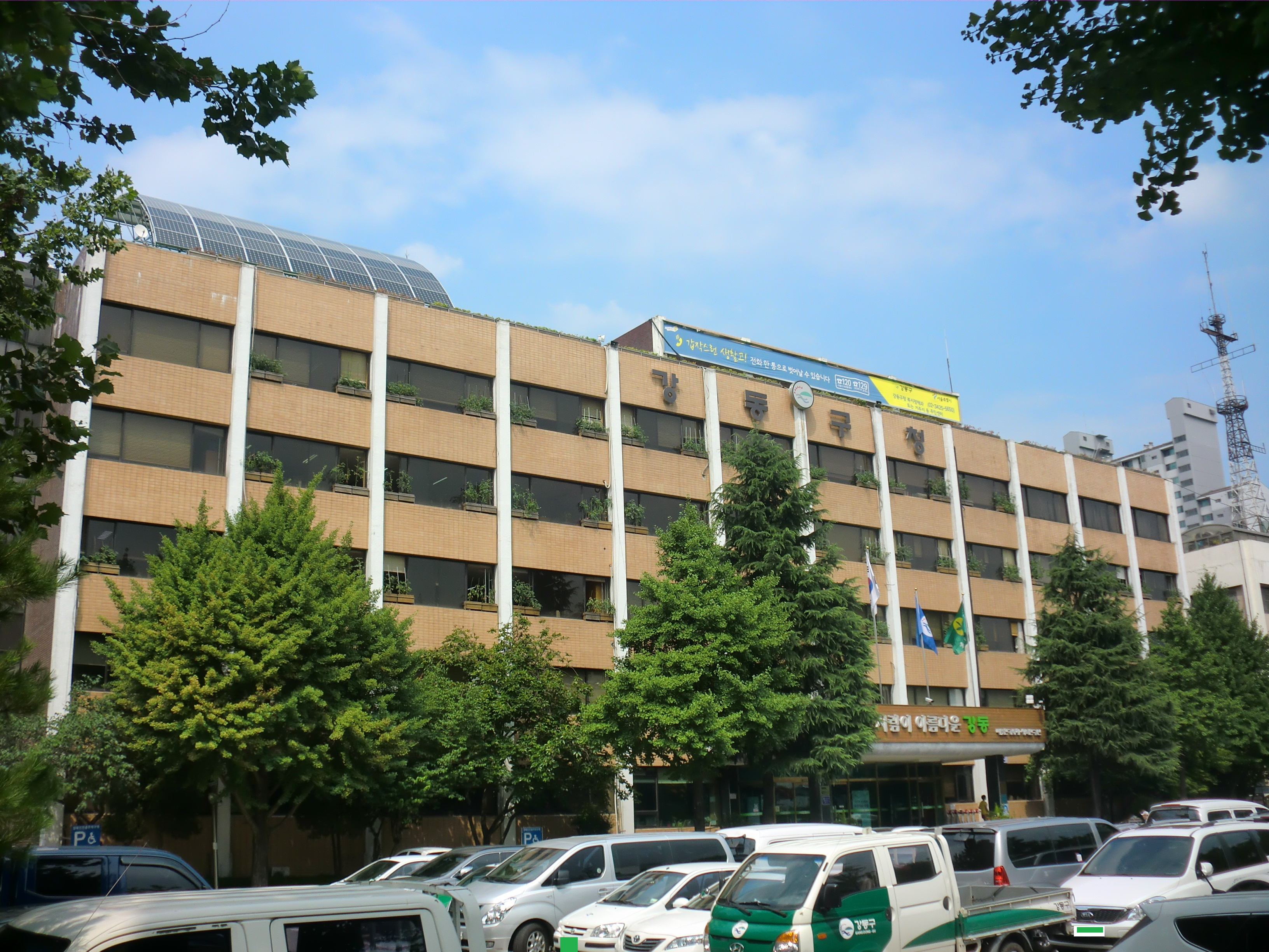 서울특별시 강동구에 있는 강동구청